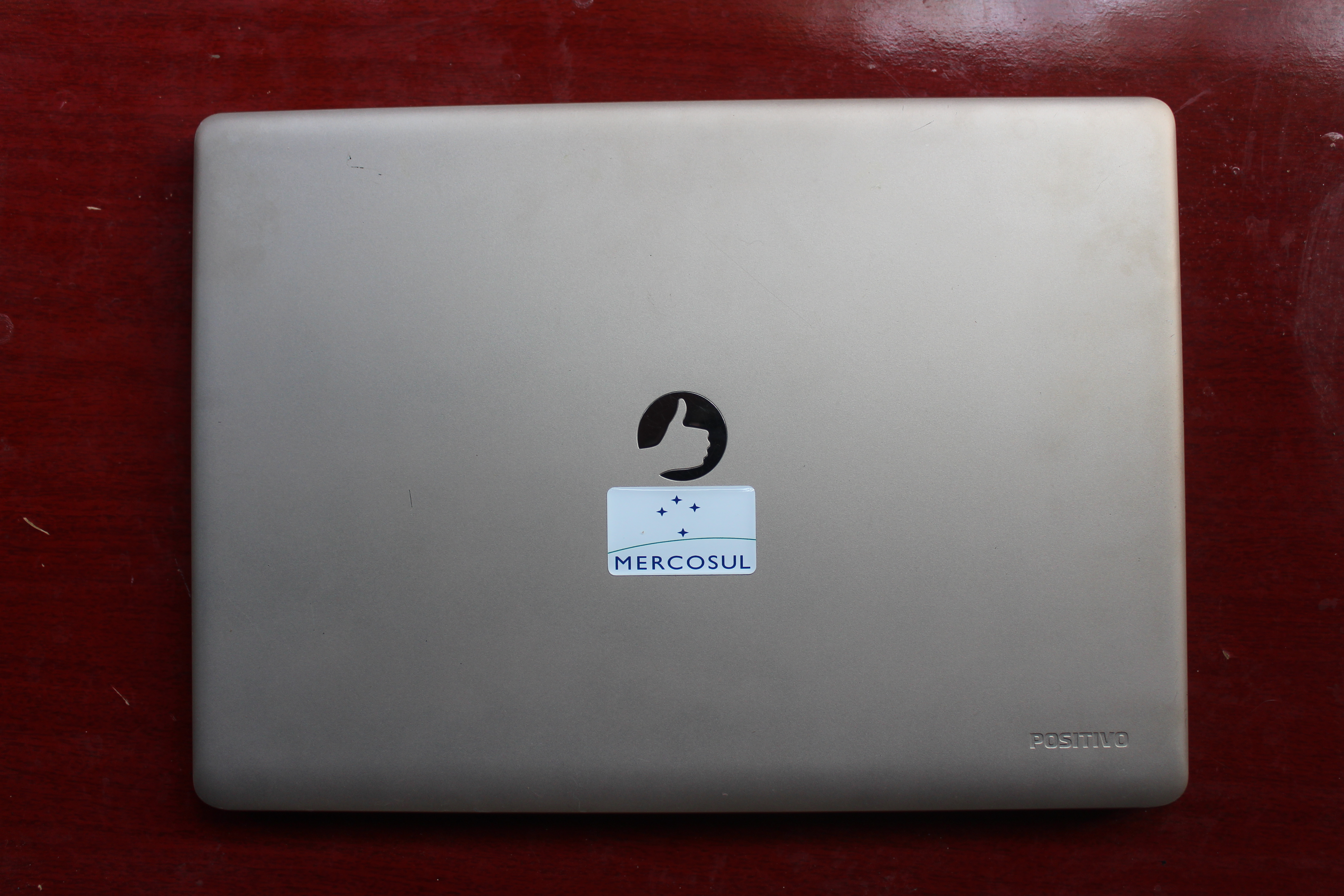 Note da positivo Tecnologia e adesivo resinado da bandeira do Mercosul